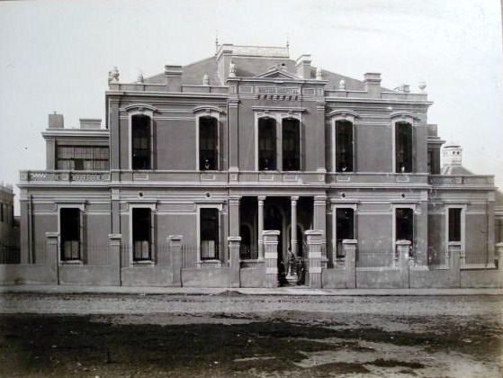 Fachada del pabellón principal del antiguo Hospital Británico de Buenos Aires, en Perdriel y Caseros. Demolido en los años '40 para la construcción del edificio actual